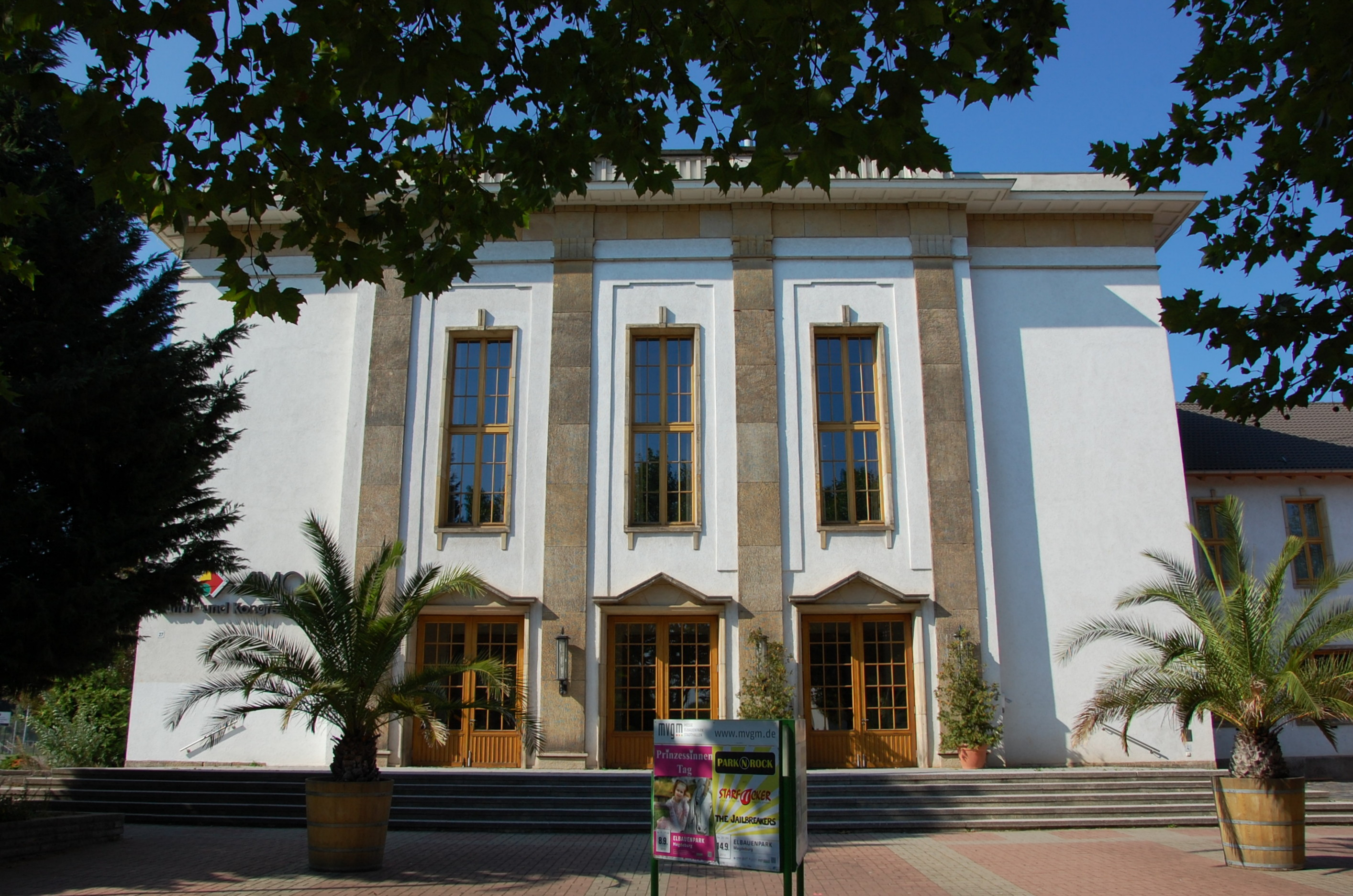 AMO Vorderfront